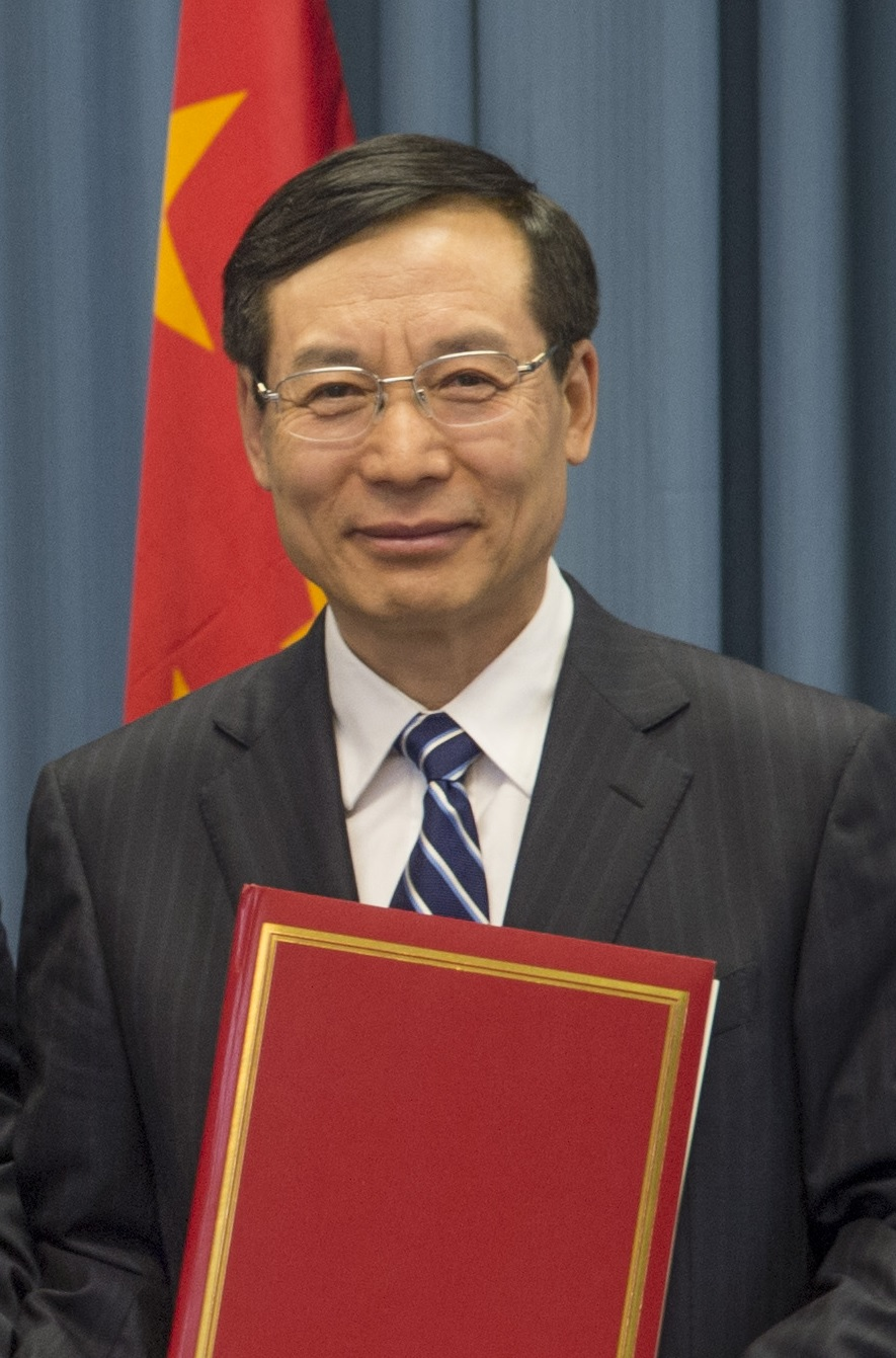 毕井泉，曾任国家食品药品监督管理总局局长、国家市场监督管理总局党组书记，2018年8月因吉林长生公司问题疫苗事件引咎辞职。摄于2017年9月7日。